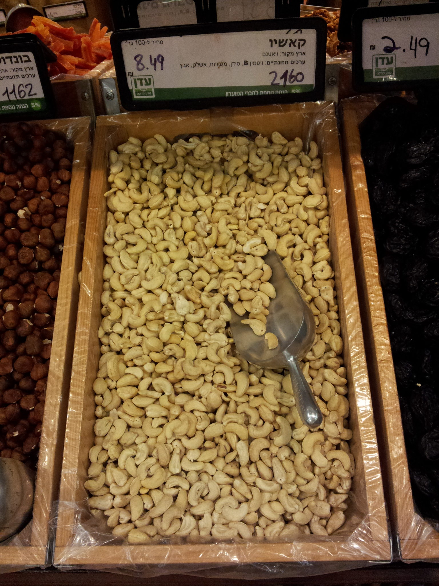 קשיו מעובד במרכול בירושלים